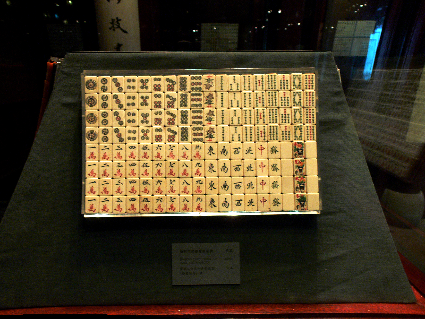 majiong museum in Tianyi Chamber